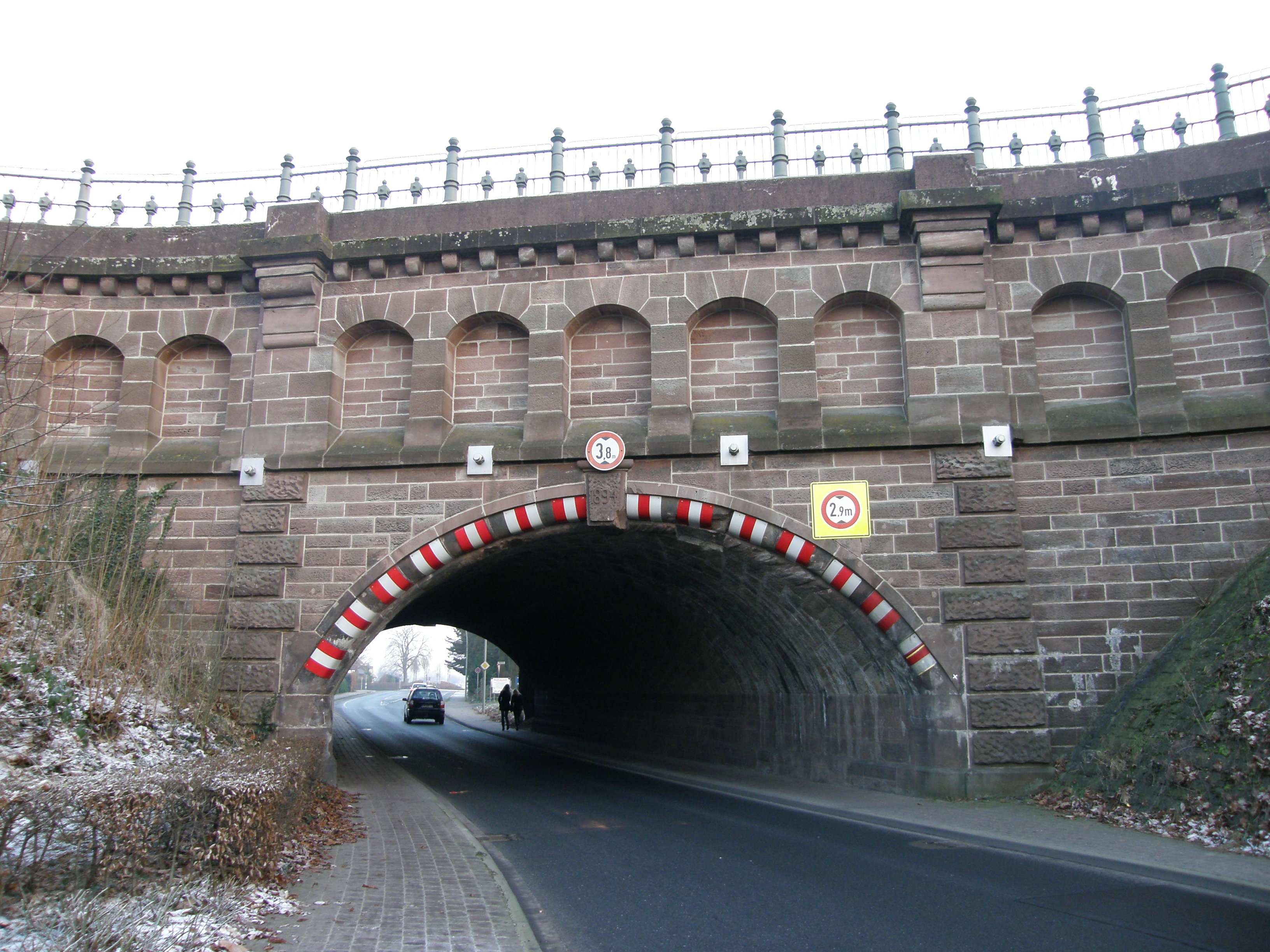 Südseite der „Schiefen Brücke“ der Alten Fahrt des Dortmund-Ems-Kanals in Olfen, gut erkennbar die Einzelsteinmeißelung rechts und links der Einfahrt.